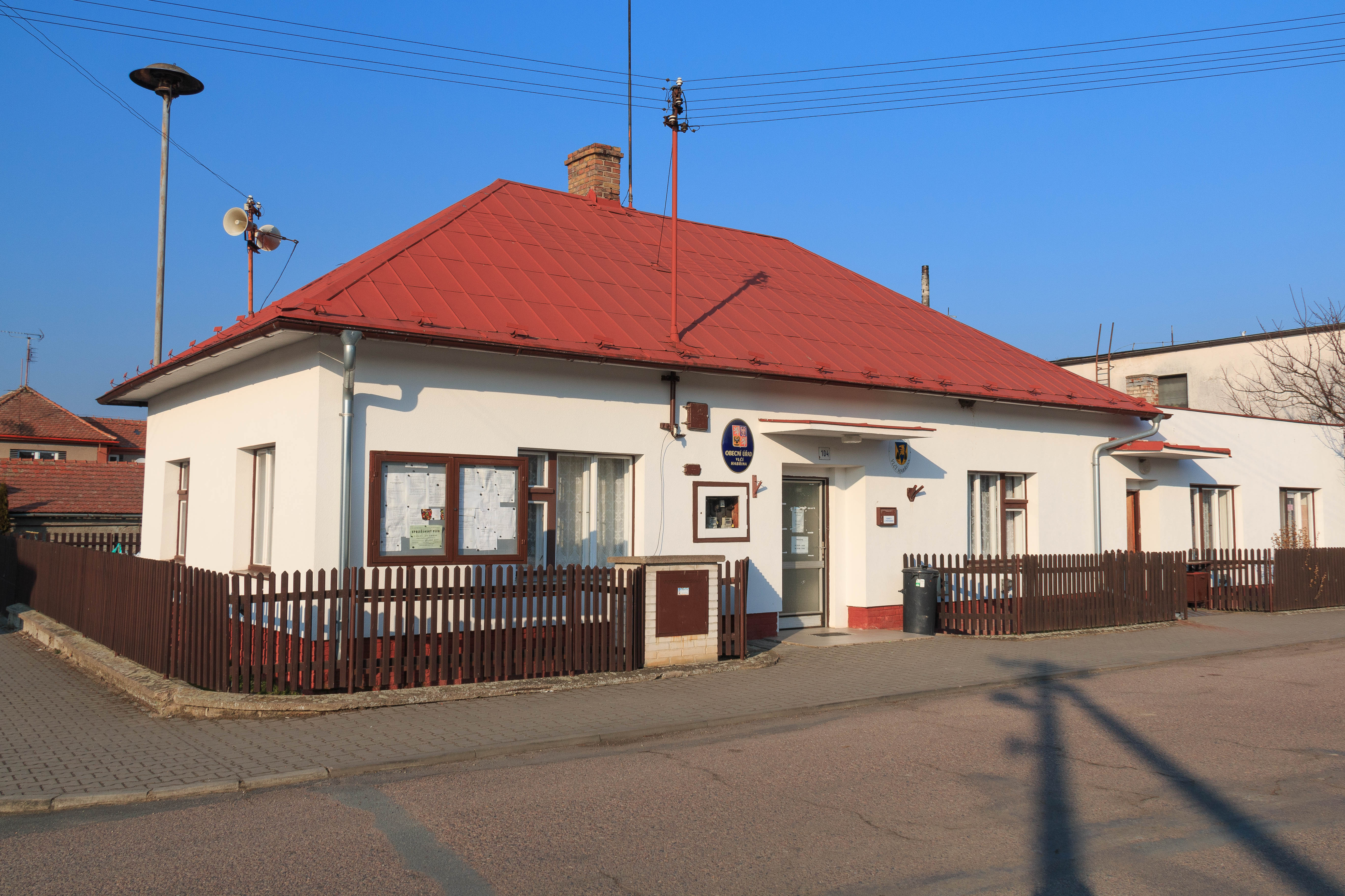 Vlčí Habřina obecní úřad